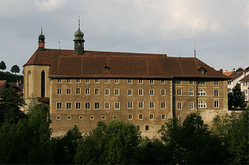 Fribourg / Freiburg: Eglise des Augustins